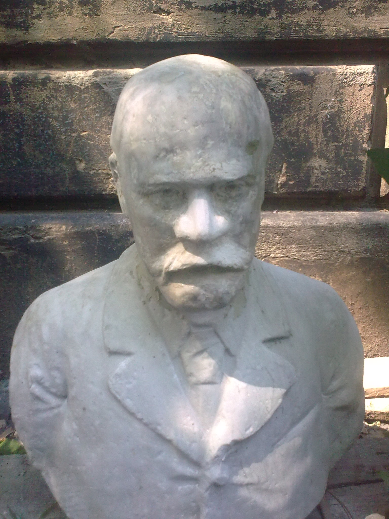 Statuia profesorului Teodor Ceontea, ridicată în anul 1912